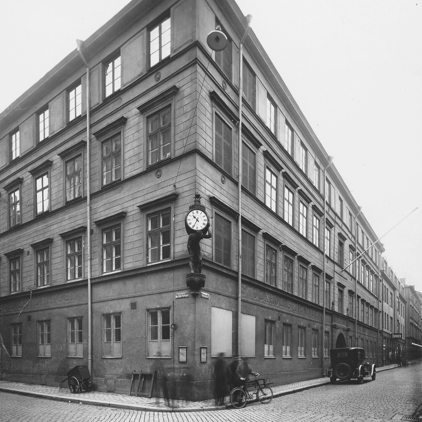 Stockholmstidningens hus, kvarteret Svalan, Klara södra kyrkogata 16 / Vattugatan 12